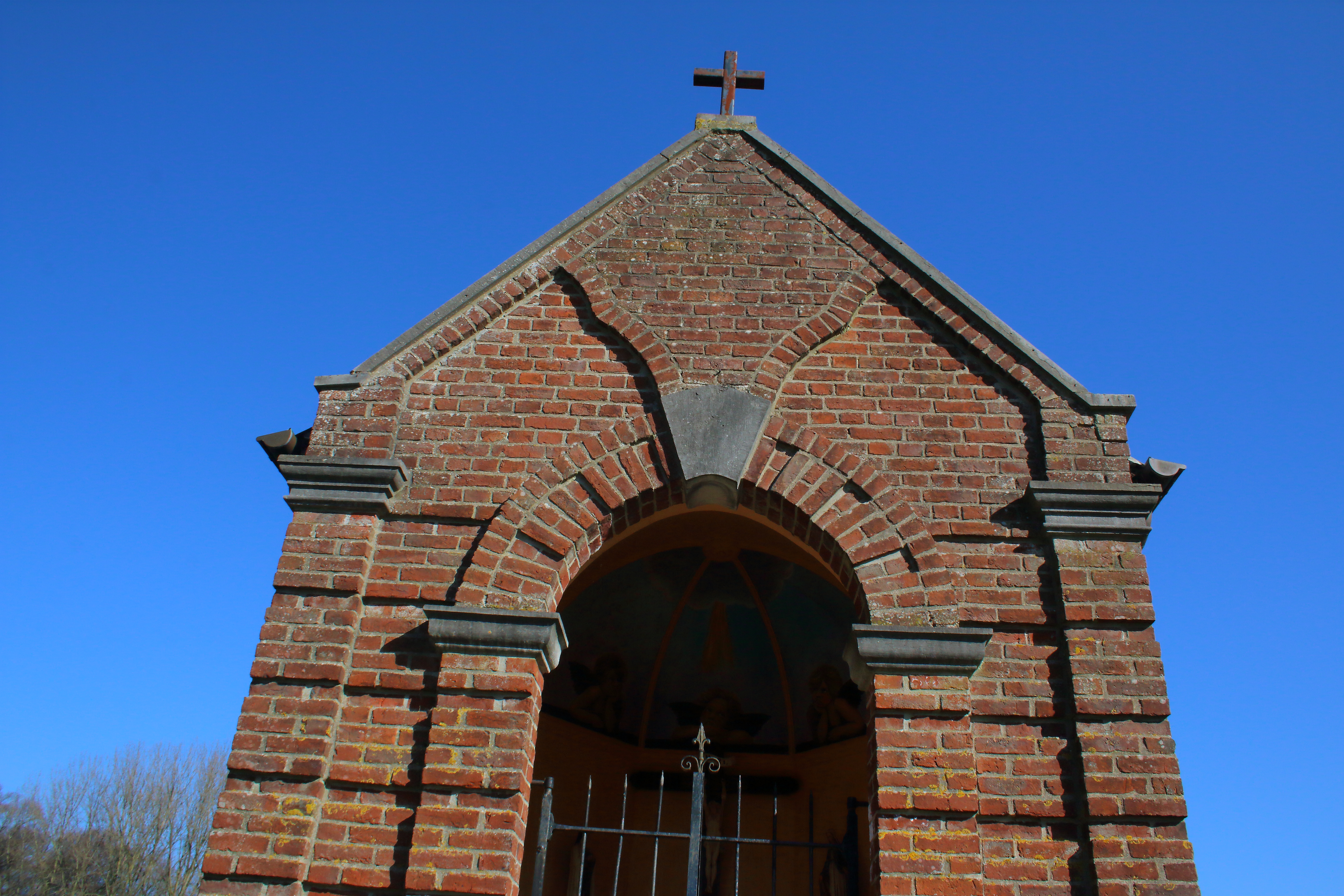 Trimpontkapel, Everbeek, Brakel, Vlaanderen, België